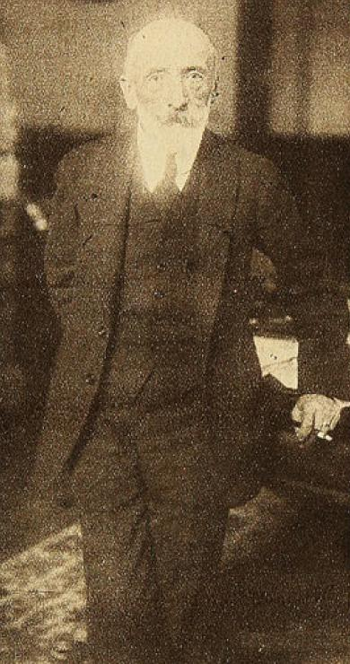 Ruperto Antonio Bahamonde Rivera (f. 7 de marzo de 19261 ), abogado y académico chileno. Fue Rector de la Universidad de Chile entre 1924 y 1926.